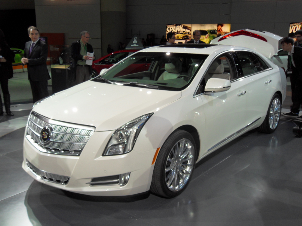 SDC11649